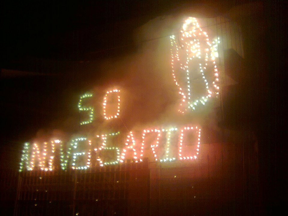 Feria de la flor de 2013